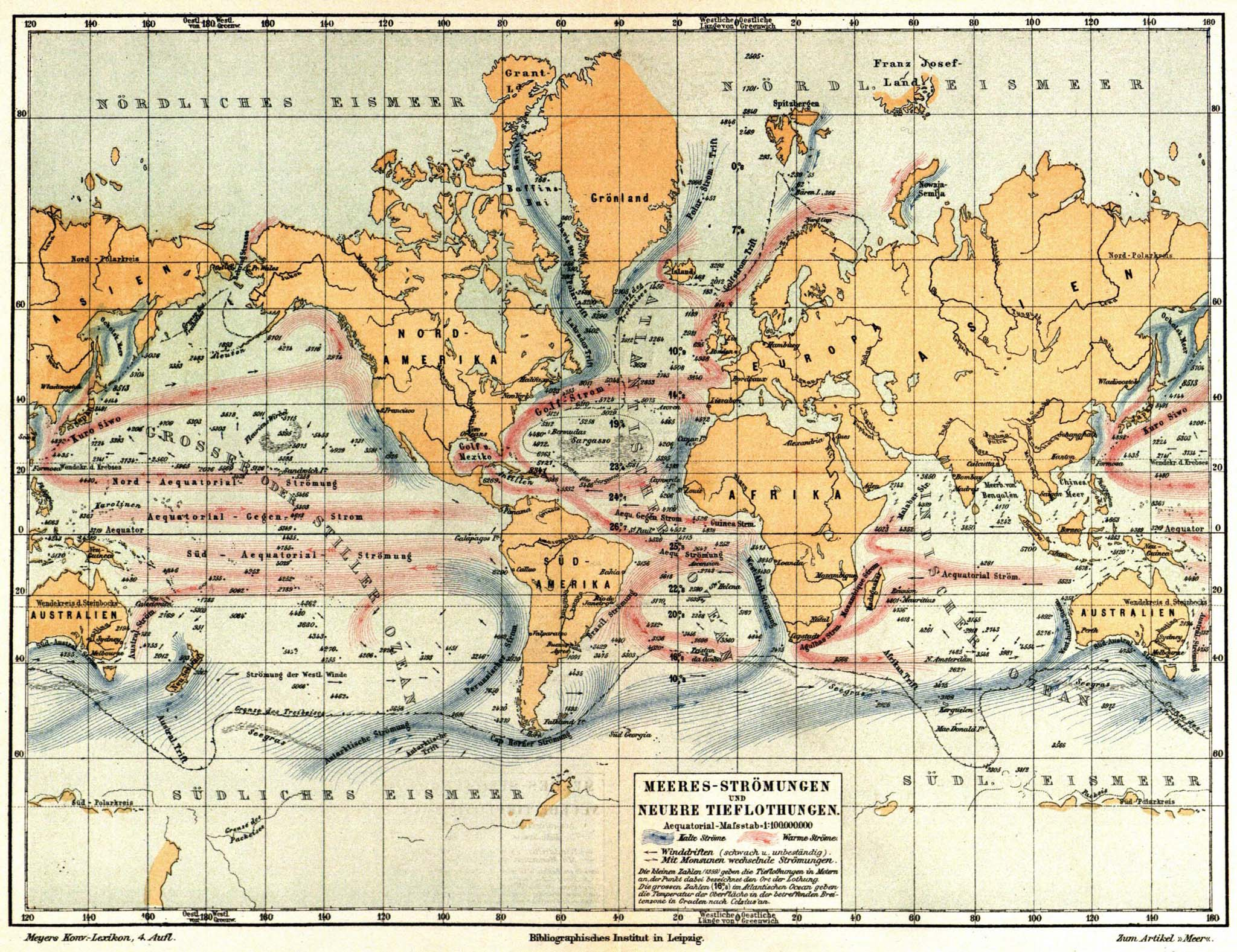 Karte „Meeres-Strömungen und neuere Tieflothungen“ zum Artikel „Meer“ (Maßstab am Äquator 1 : 100.000.000)